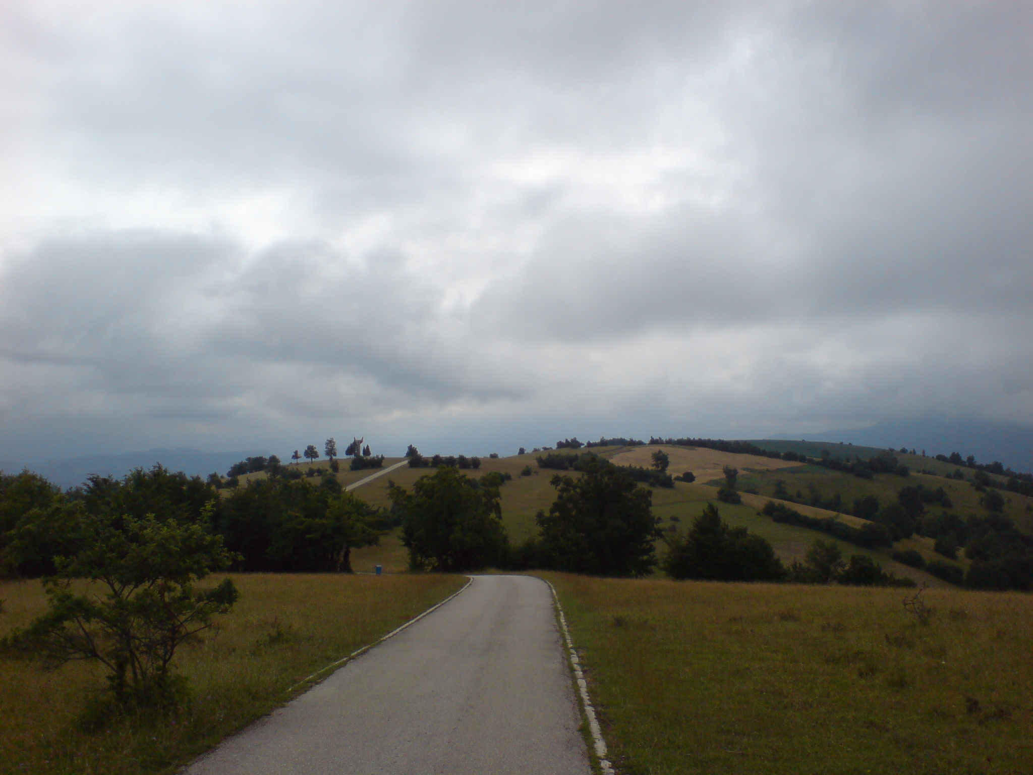 Smetovi hill, near Zenica, Bosnia-Hercegovina